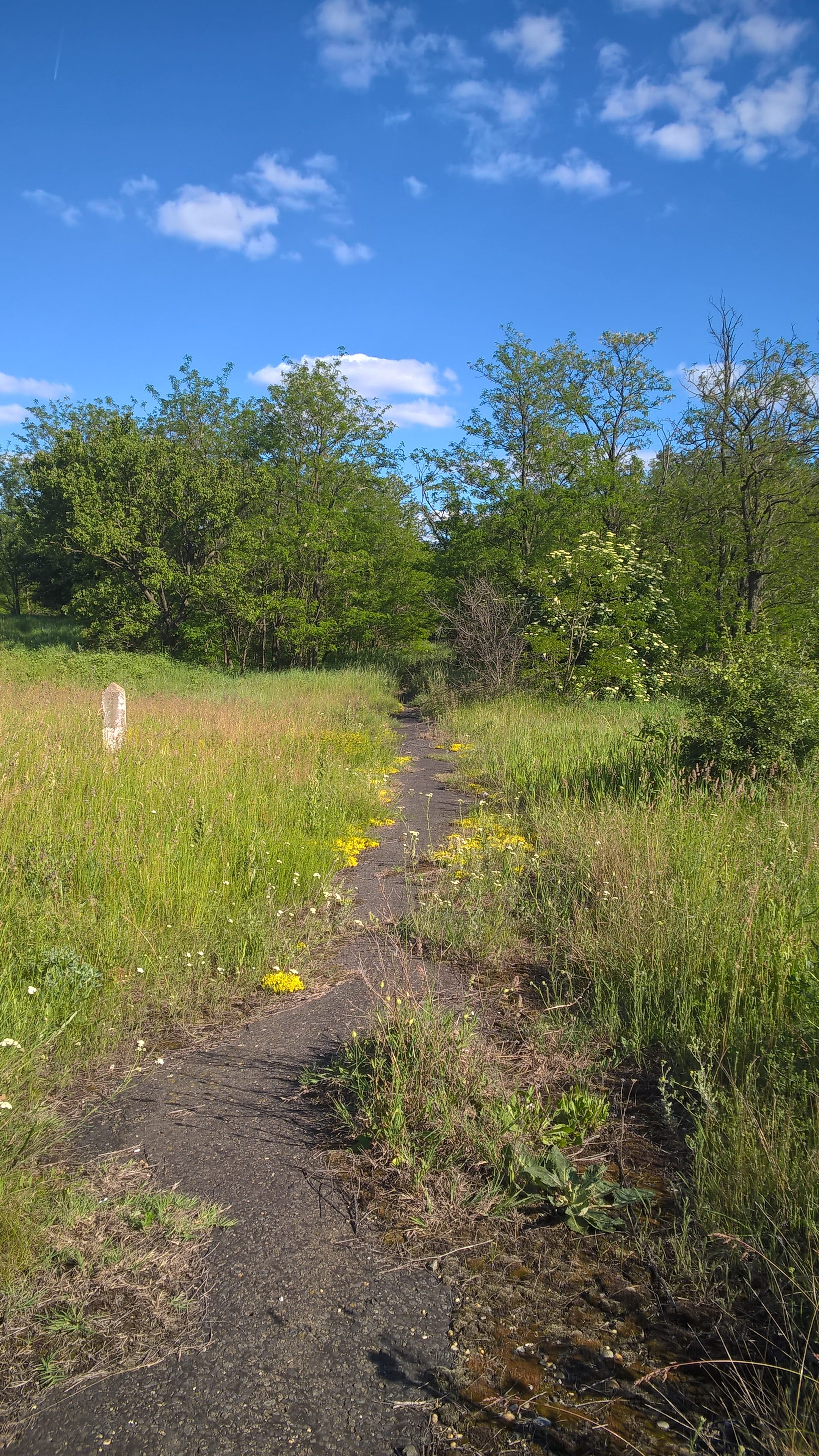 Az öreg országút növényekkel benőtt, 1930-as évek óta használaton kívüli rövid szakasza a 48-as km közelében.